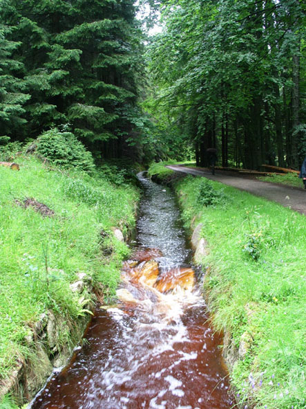 Schwarzenbergscher Schwemmkanal,selbst fotografiert Juli 2005,freie Lizenz